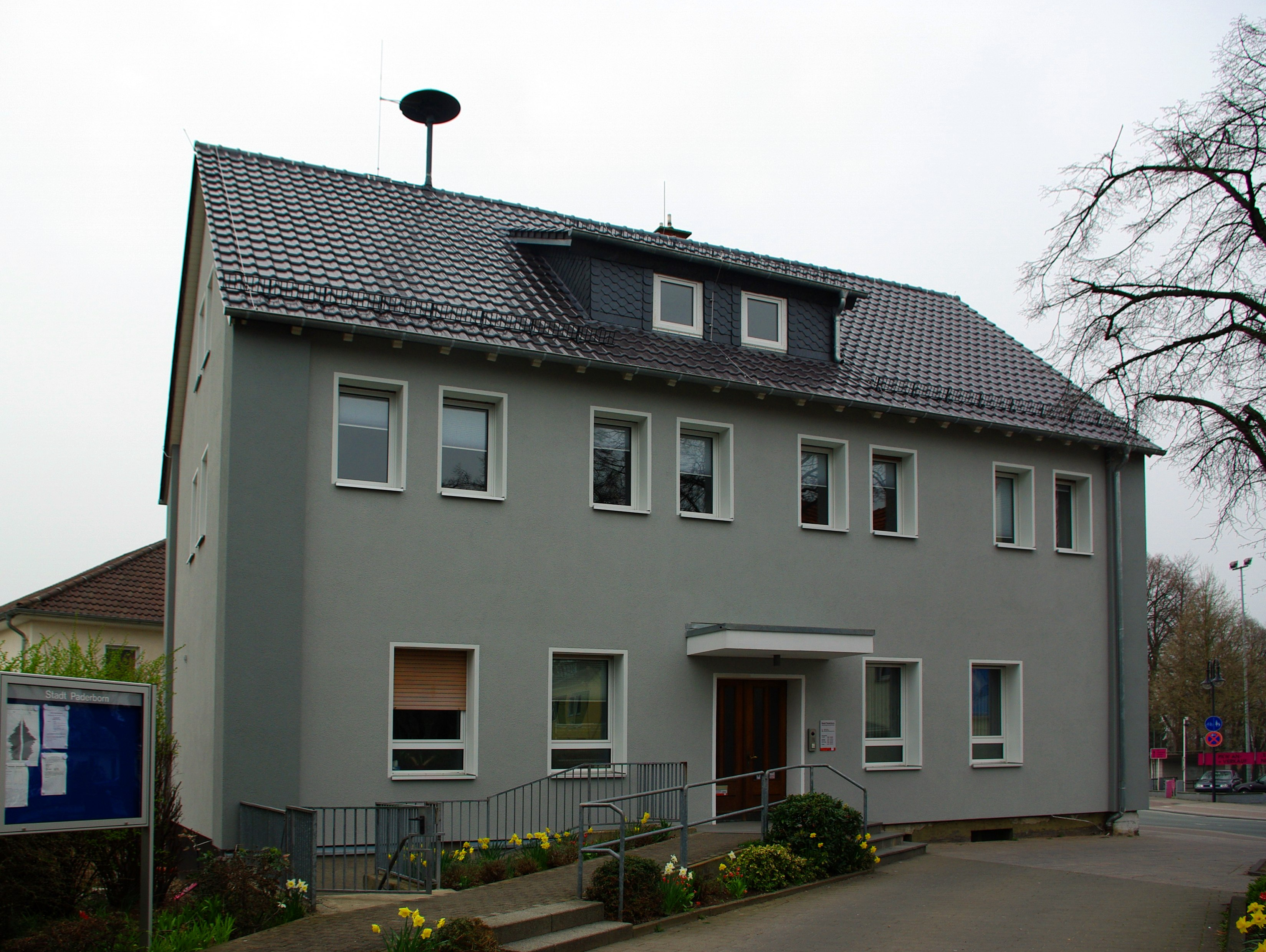 Elsen, Paderborn, Deutschland: Verwaltungsnebenstelle der Stadt Paderborn im Stadtbezirk Elsen.